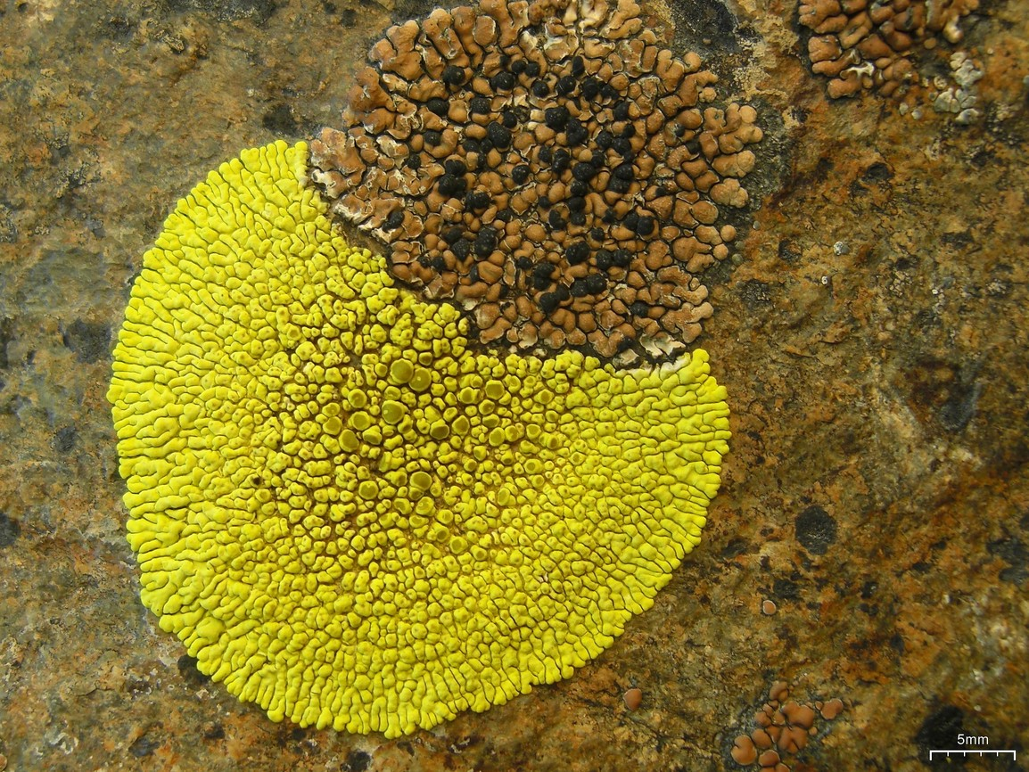 Lecidea atrobrunnea and Acarospora contigua 20100827.1 Frazier Mtn., Los Padres NF, so. CA